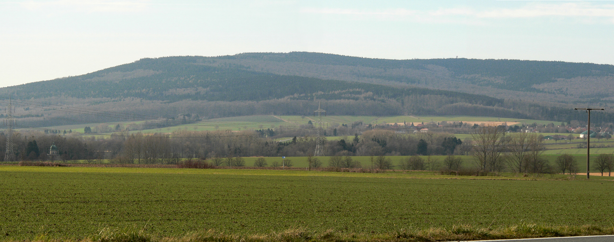 Süntel mit Hohe Egge aus Richtung Hasperde